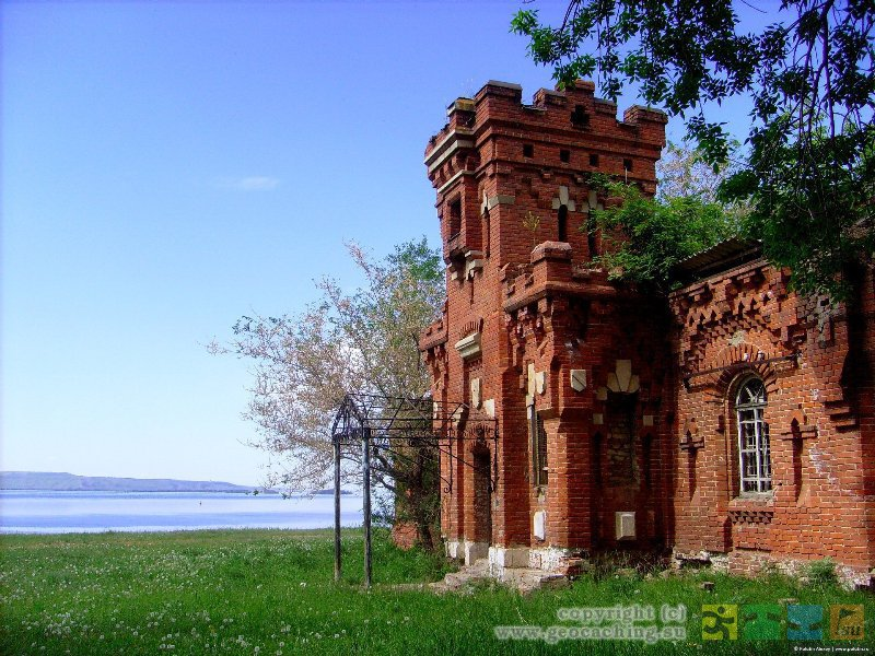 Усадьба Самариных, Приволжье, улица Советская, 19